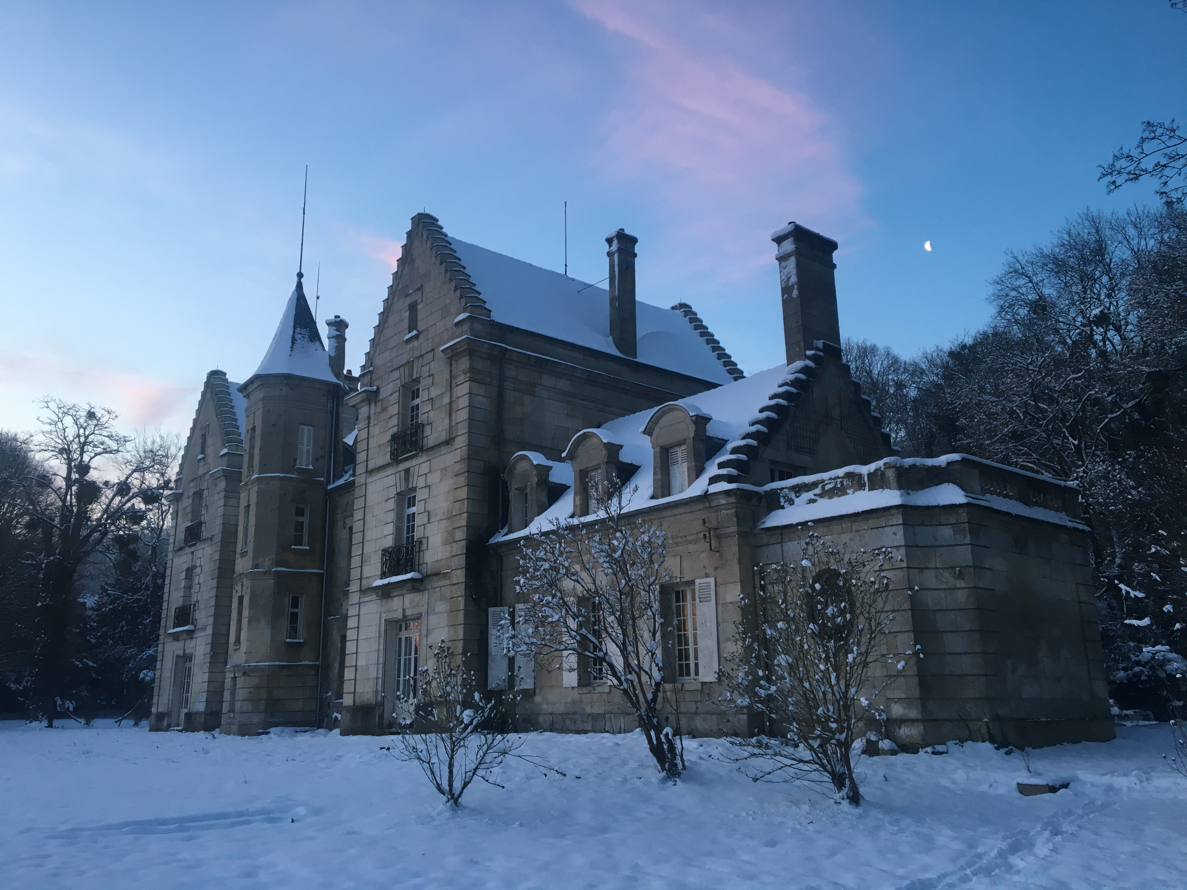 Château de Montois en février 2018